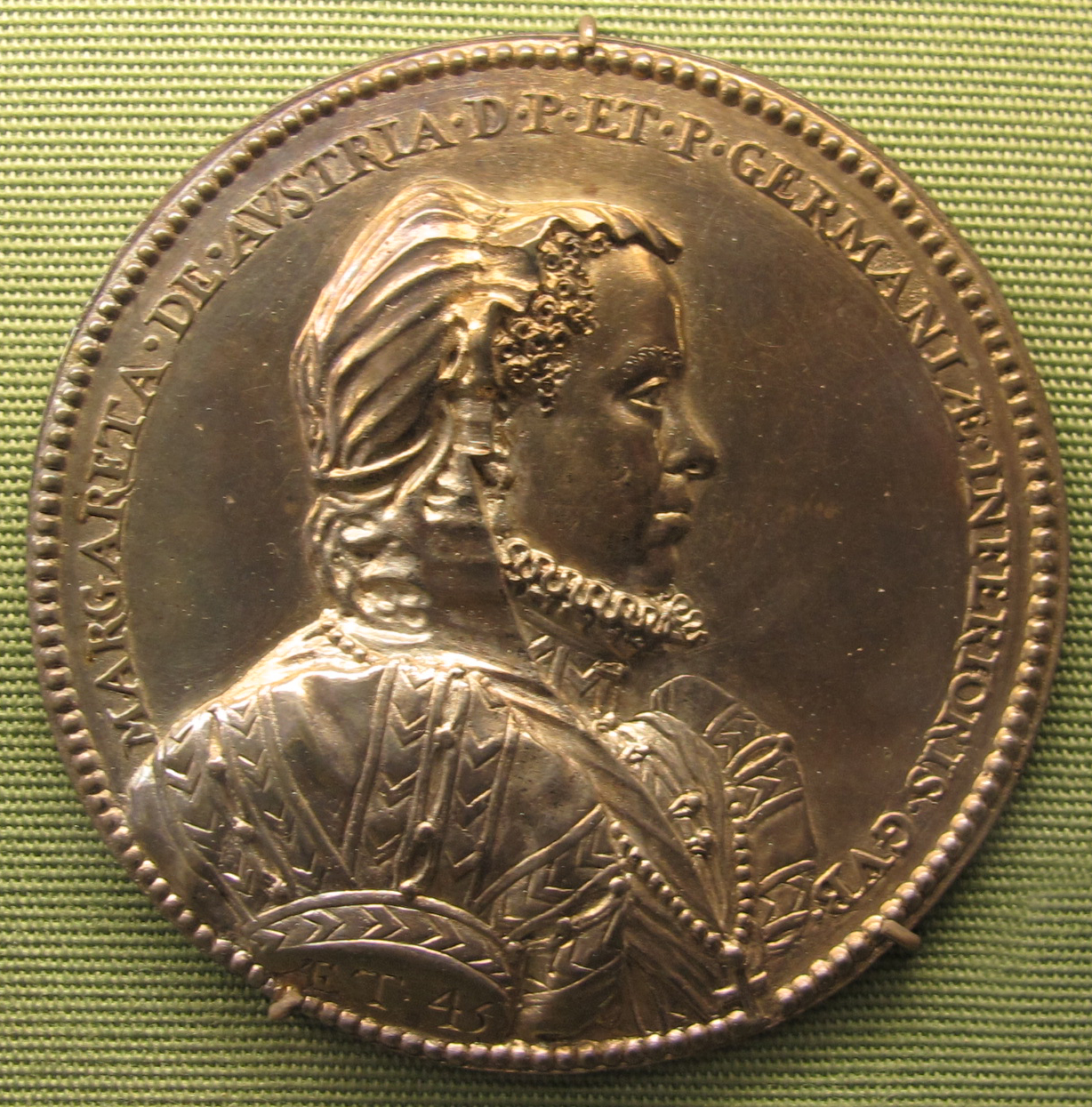 Margherita di Parma, governatrice dei Paesi Bassi, arg, 1556